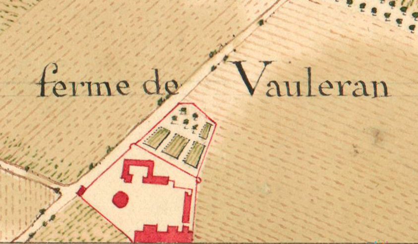 Plan de la Ferme de Vaulerent représenté sur l'Atlas Trudaine. Base Archim: CP/F/14/8443